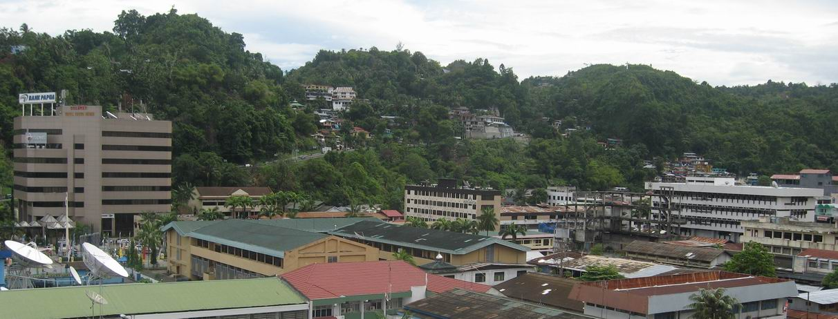 Jayapura city